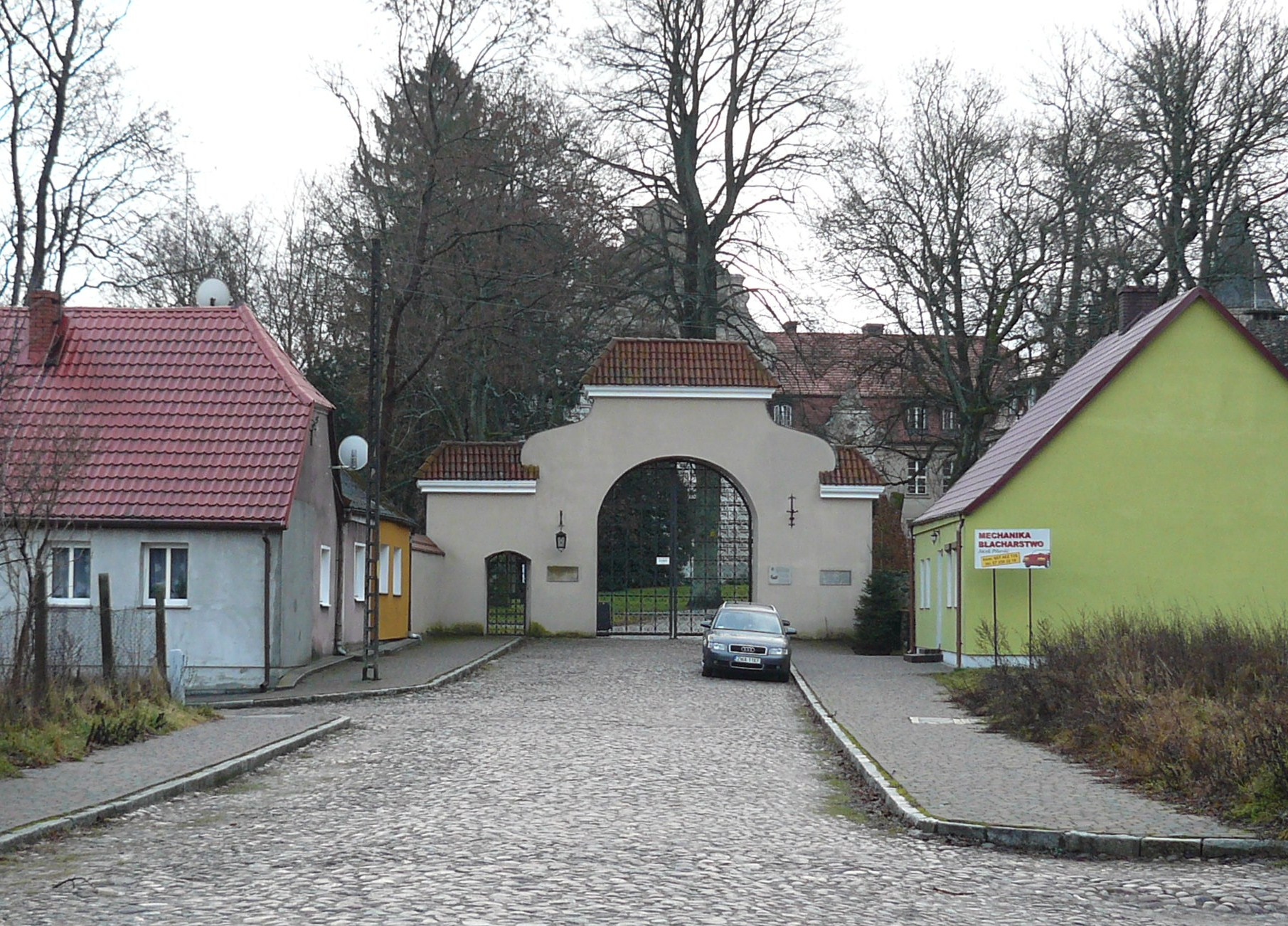 Tuczno, zamek, brama. Unknown